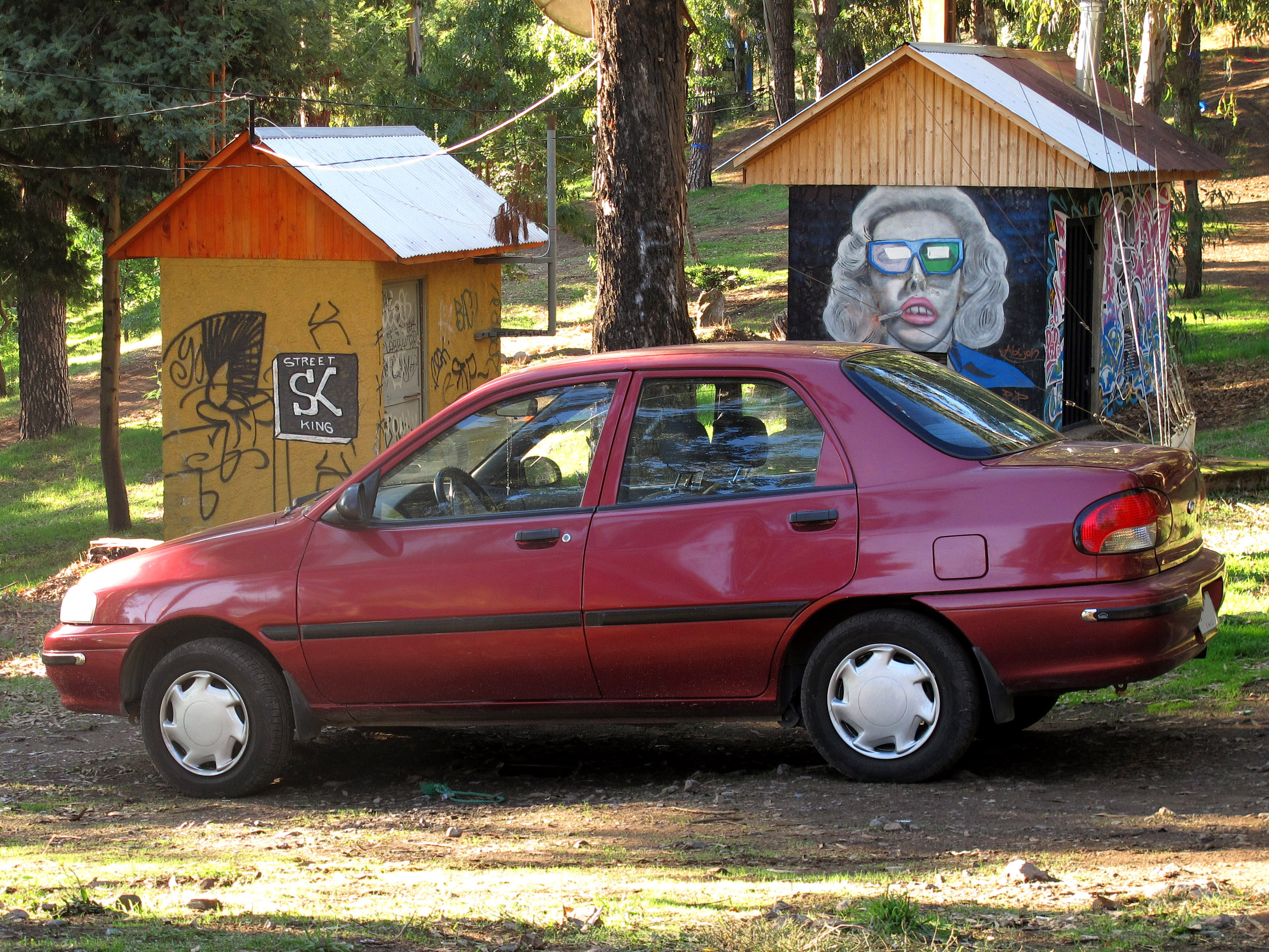 Kia Avella 1.5 GLi 1998